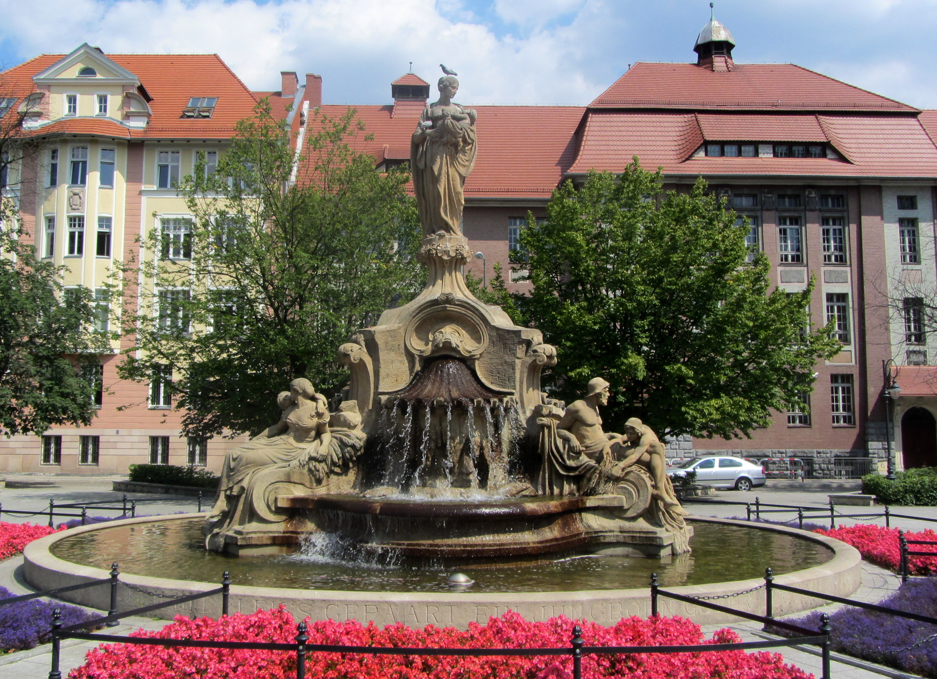 Ceres Brunnen in oppeln